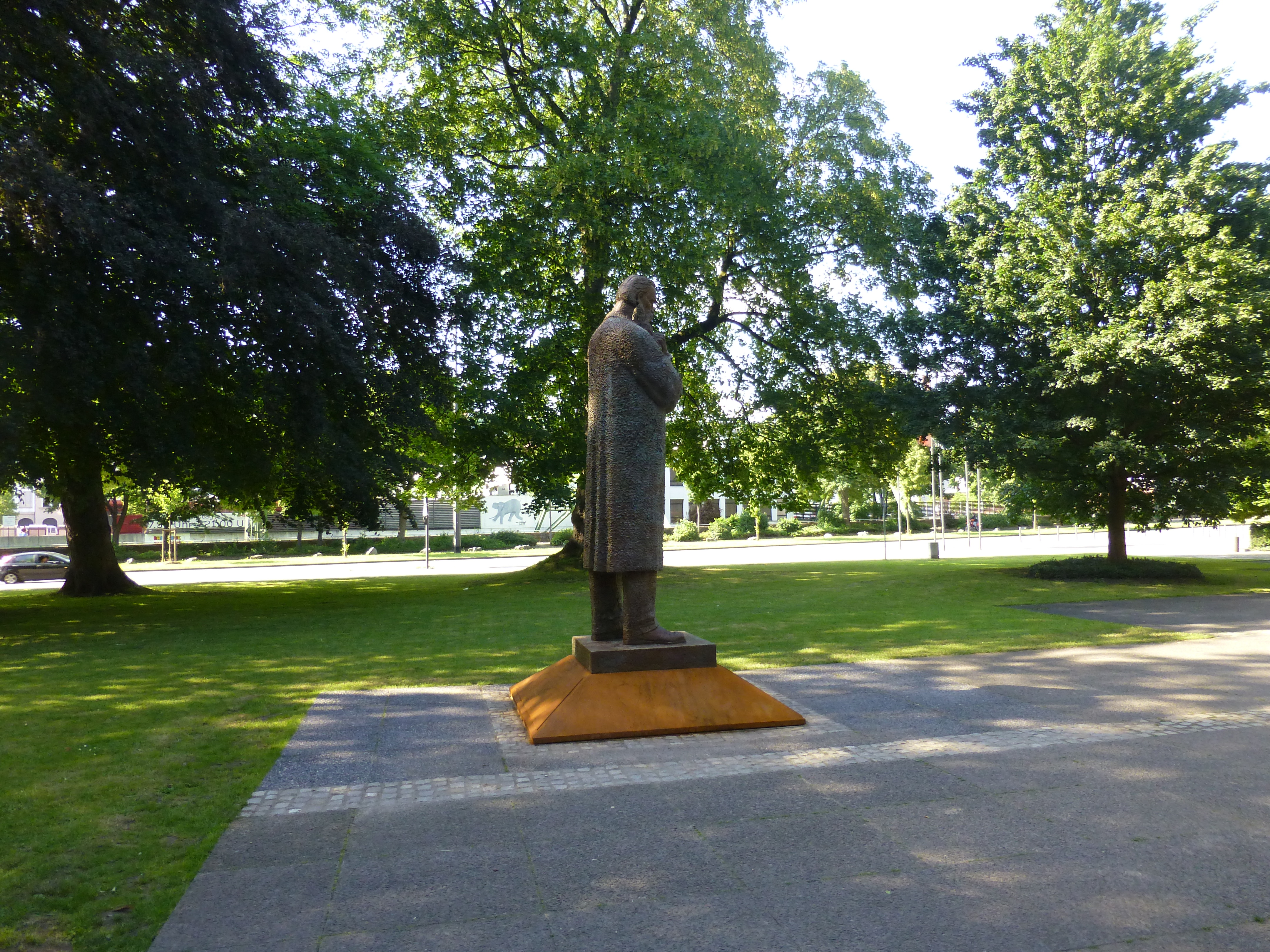 Engelsgarten, Wuppertal